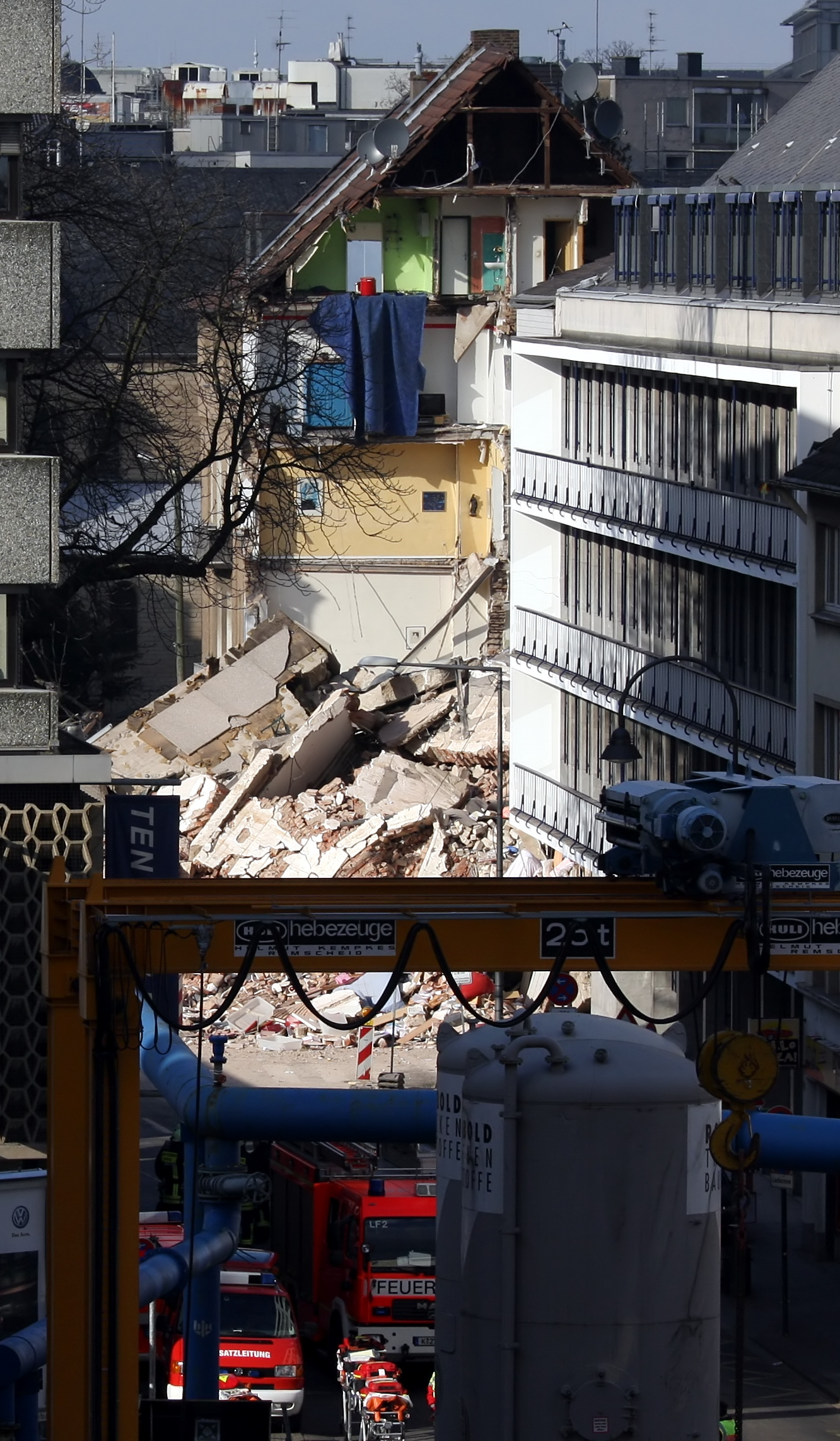 Eingestürztes Gebäudes des Stadthistorischen Archivs Köln in der Severinstraße